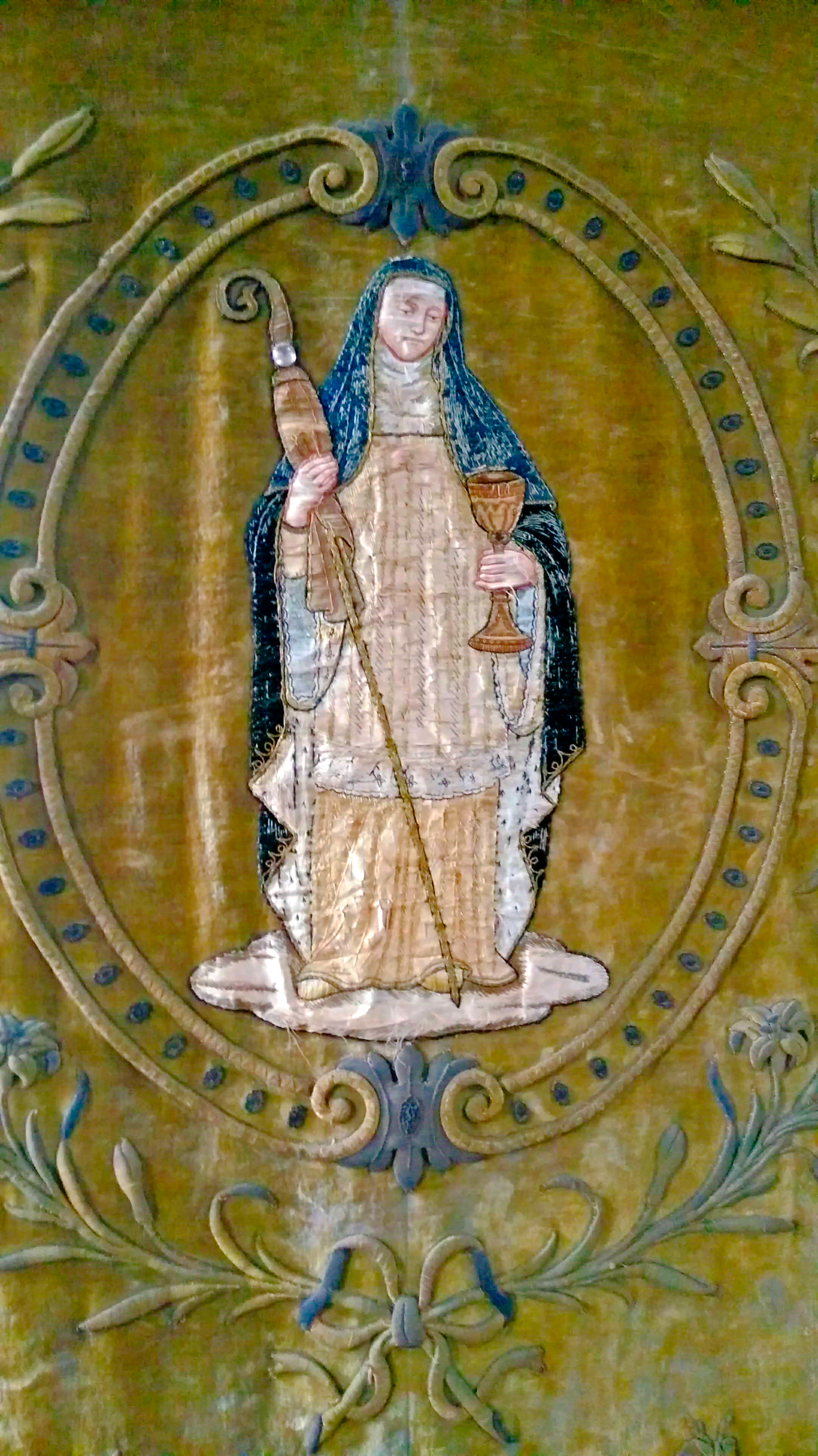 Embroidery of Saint Adele of Orp-le-grand found inside the Saint Martin and Saint Adele church in Orp-le-grand.